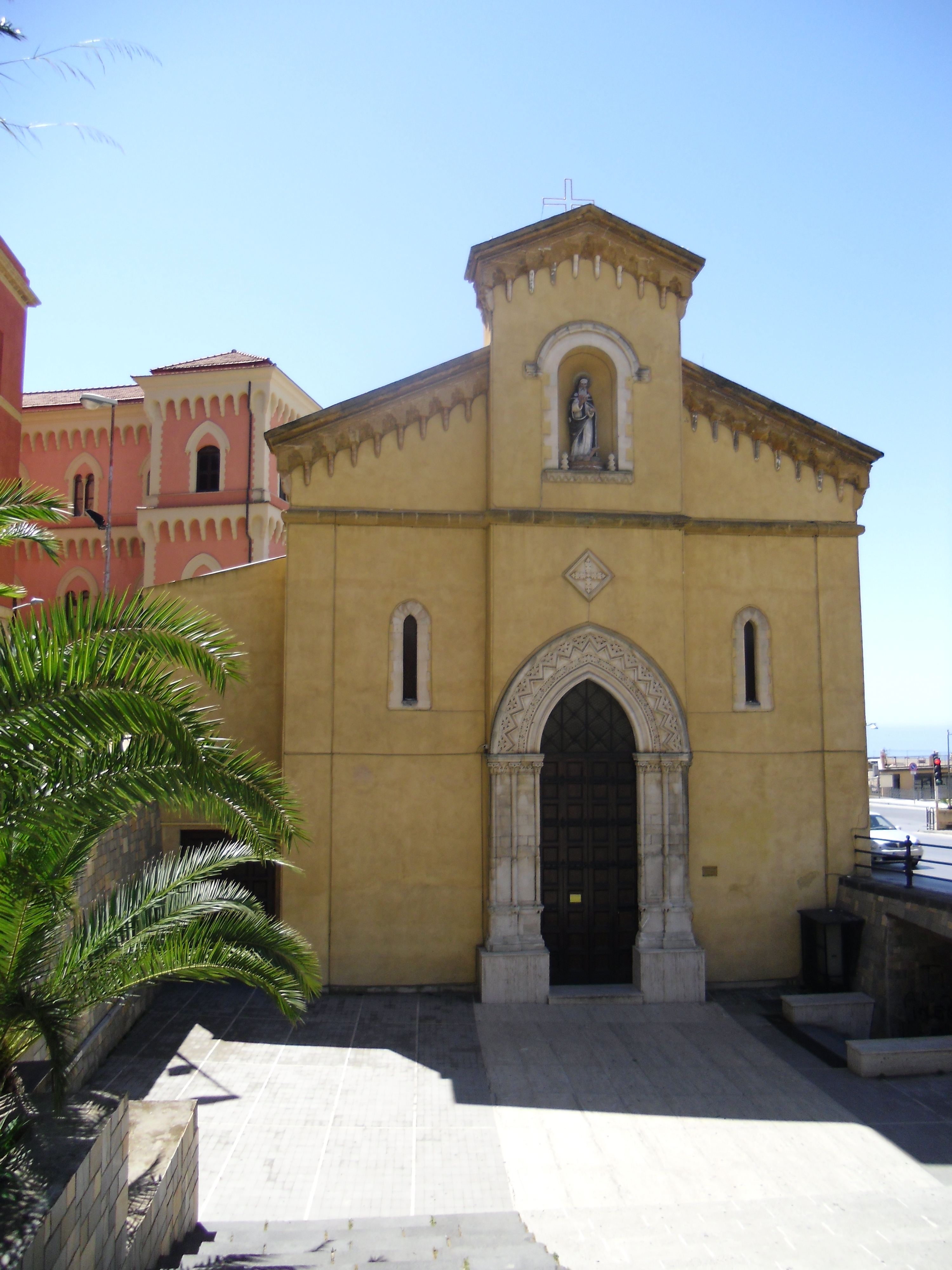 Santuario di san Lorenzo Agrigento